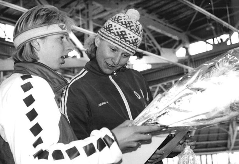 Christine Aaftink, Angela Hauck ADN-ZB Settnik 25.11.89 Berlin: Eisschnellauf-Weltcup der Frauen- Zum Auftakt dieser Wettbewerbe in der Eislaufhalle in Hohenschönhausen holten sich die Gestgeberinnen die ersten Siegpunkte. Sprint-Vizeweltmeisterin Angela Hauck (r.) siegte auf der 500-m-Strecke in 40,96 s vor der Niederländerin Christine Aaftink.